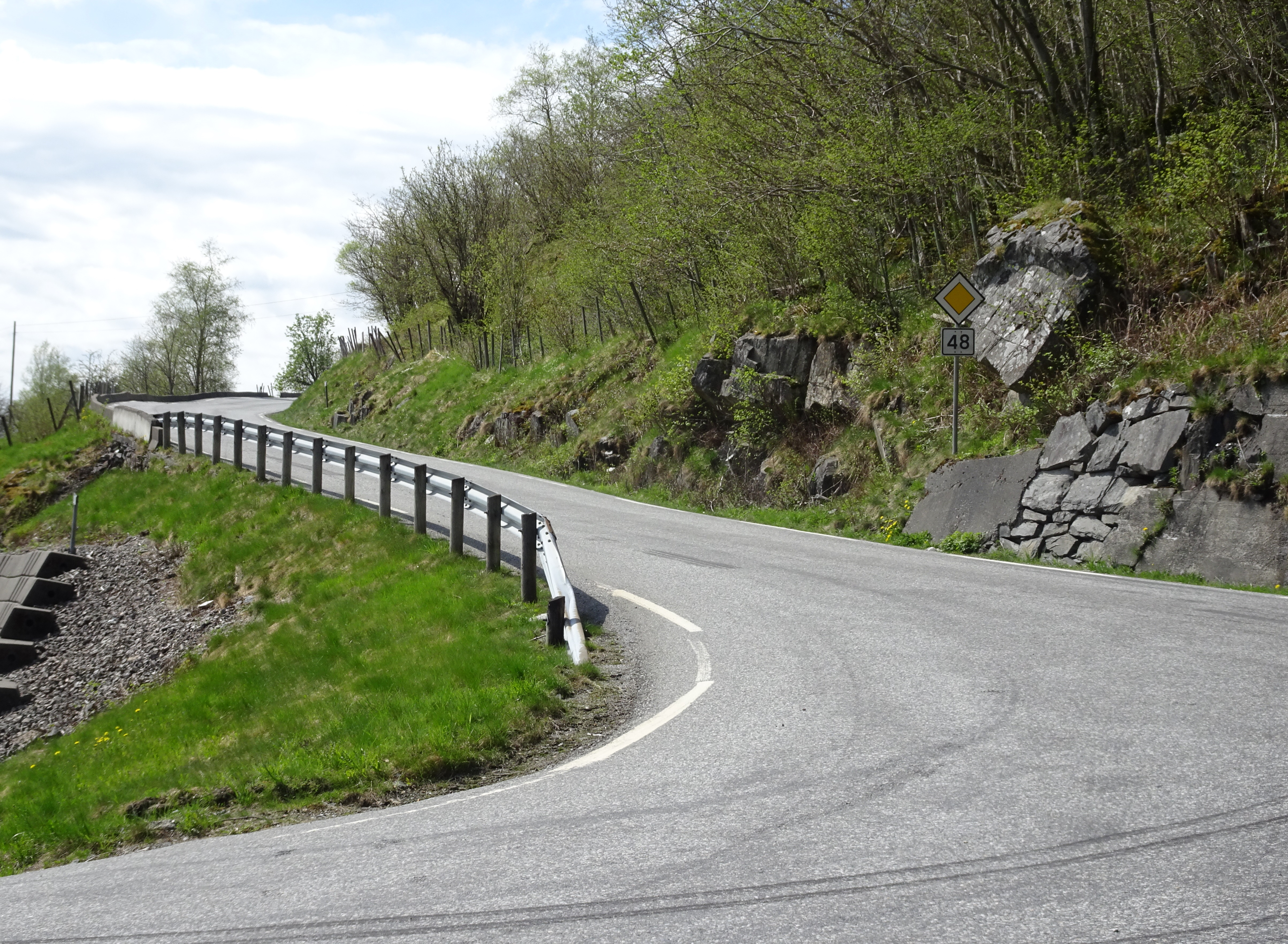 Sørøstenden av Skånevikvegen (fylkesvei 548, tidl. 48), ved det gamle løpet til E134 (Stordalsvegen, utenfor tunnelløpet)